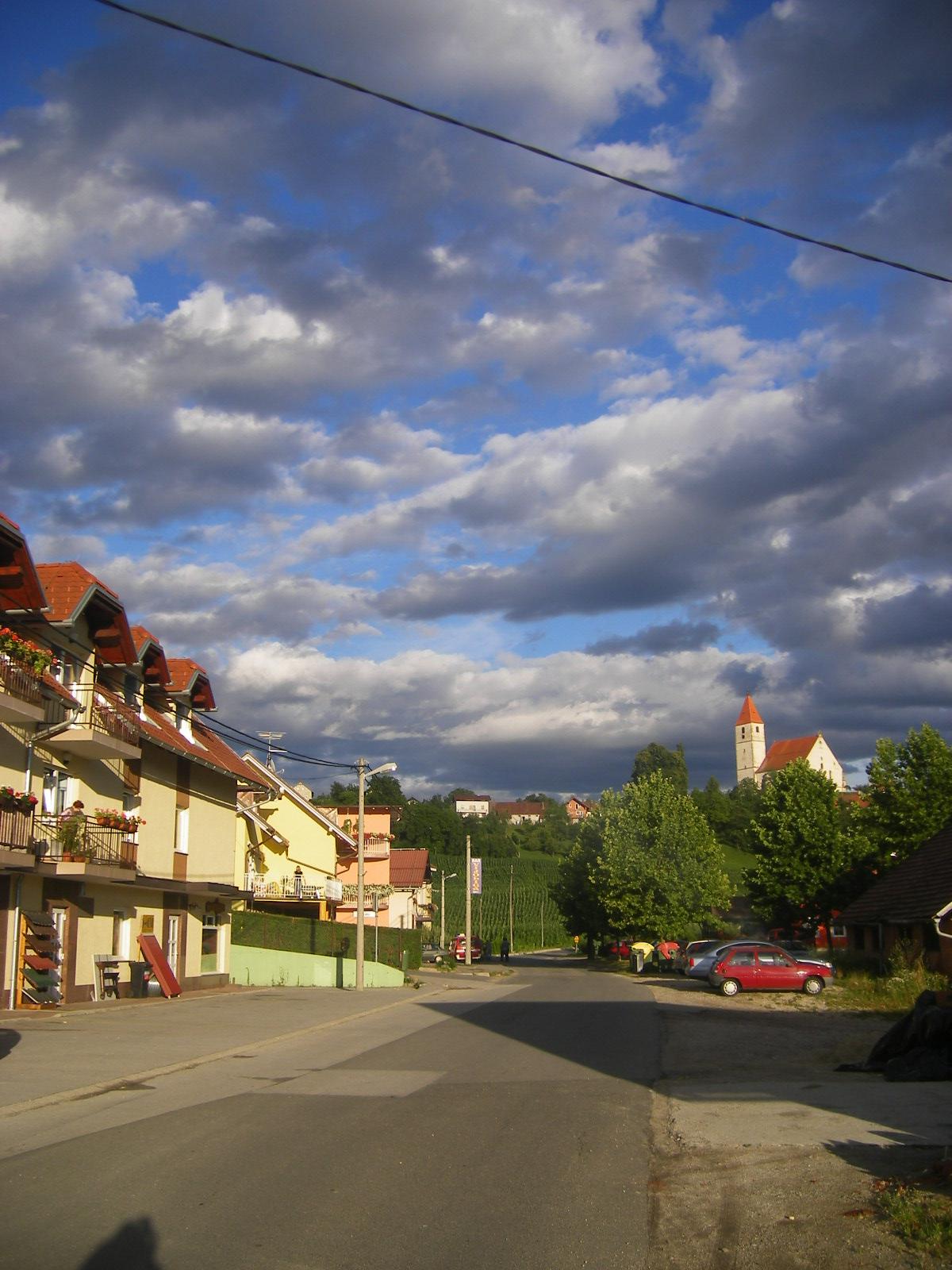 Benedikt